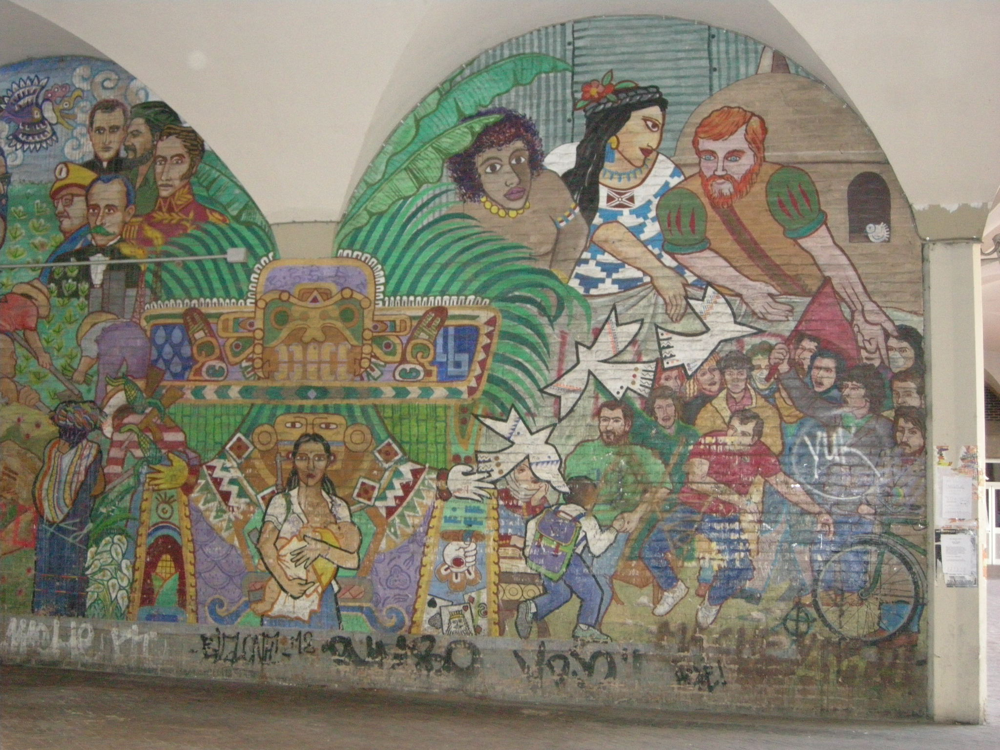 Bologna, graffiti sotto i portici via zamboni